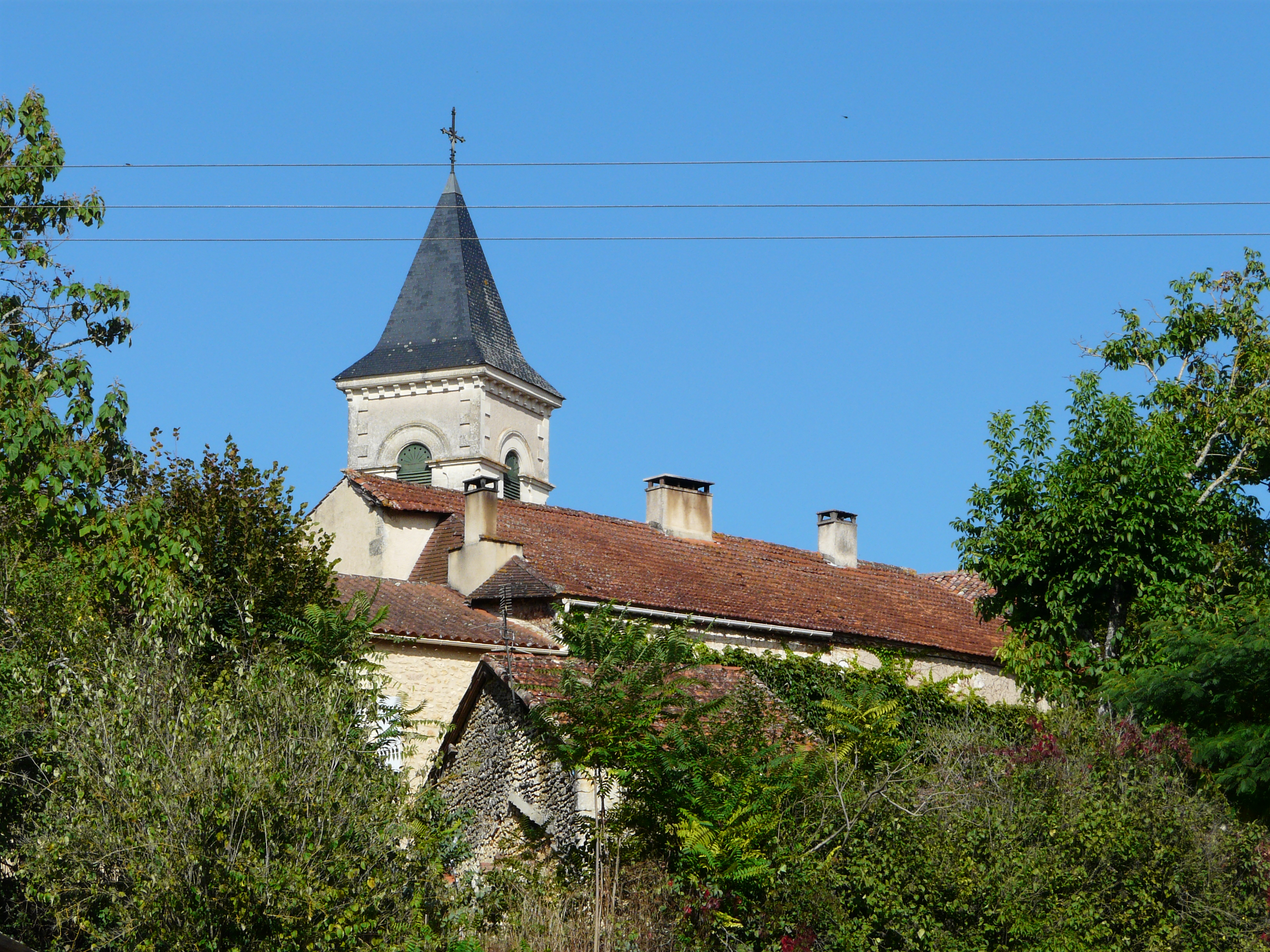 Le village et le clocher de l'église Saint-Michel vus depuis le sud-est, Saint-Michel-de-Villadeix, Dordogne, France.